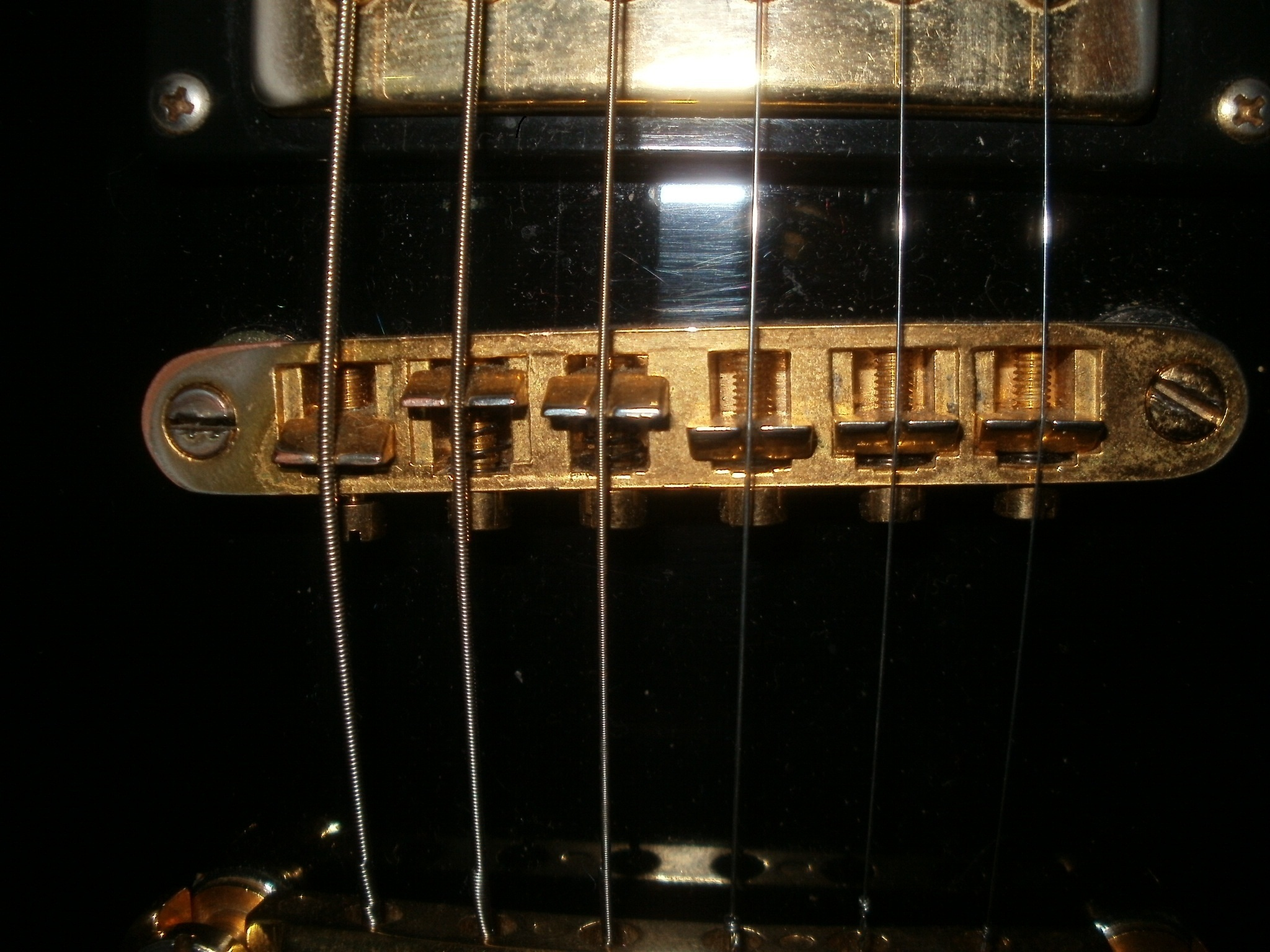 Мензура на электро-гитаре.